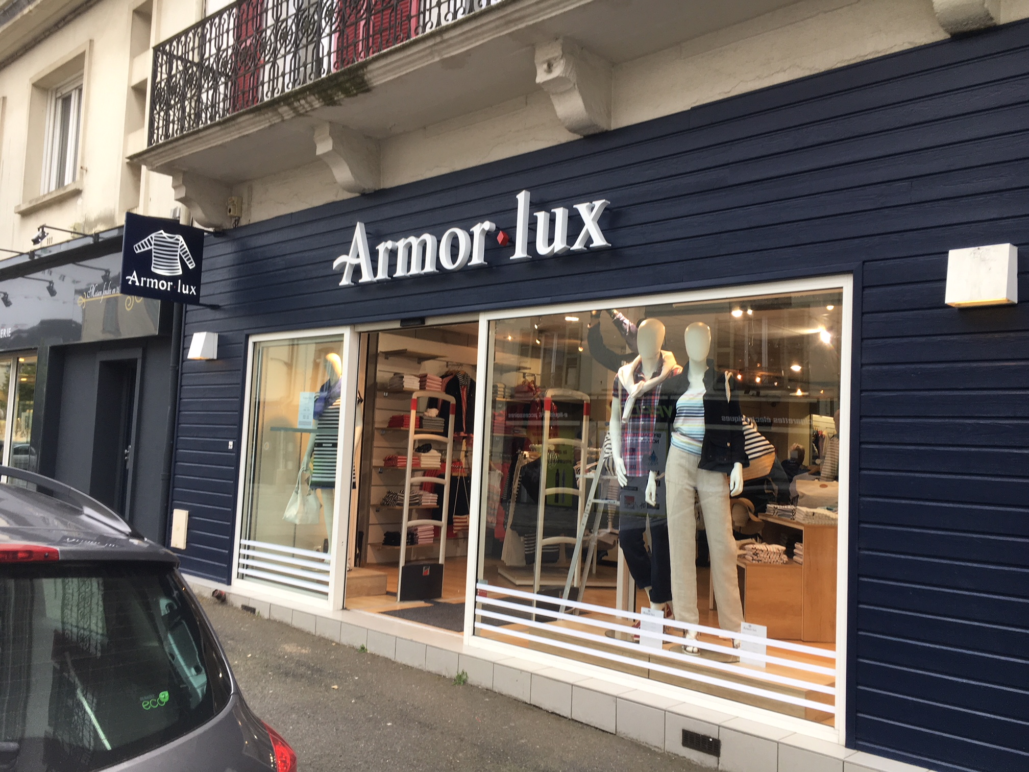 Magasin de la maison Armor-Lux ouvert en avril 2019 à Carhaix-Plouger, rue du Général-Lambert au centre-ville. Il s'agit de la 65e boutique de la marque, avec une surface de vente de 110 m².